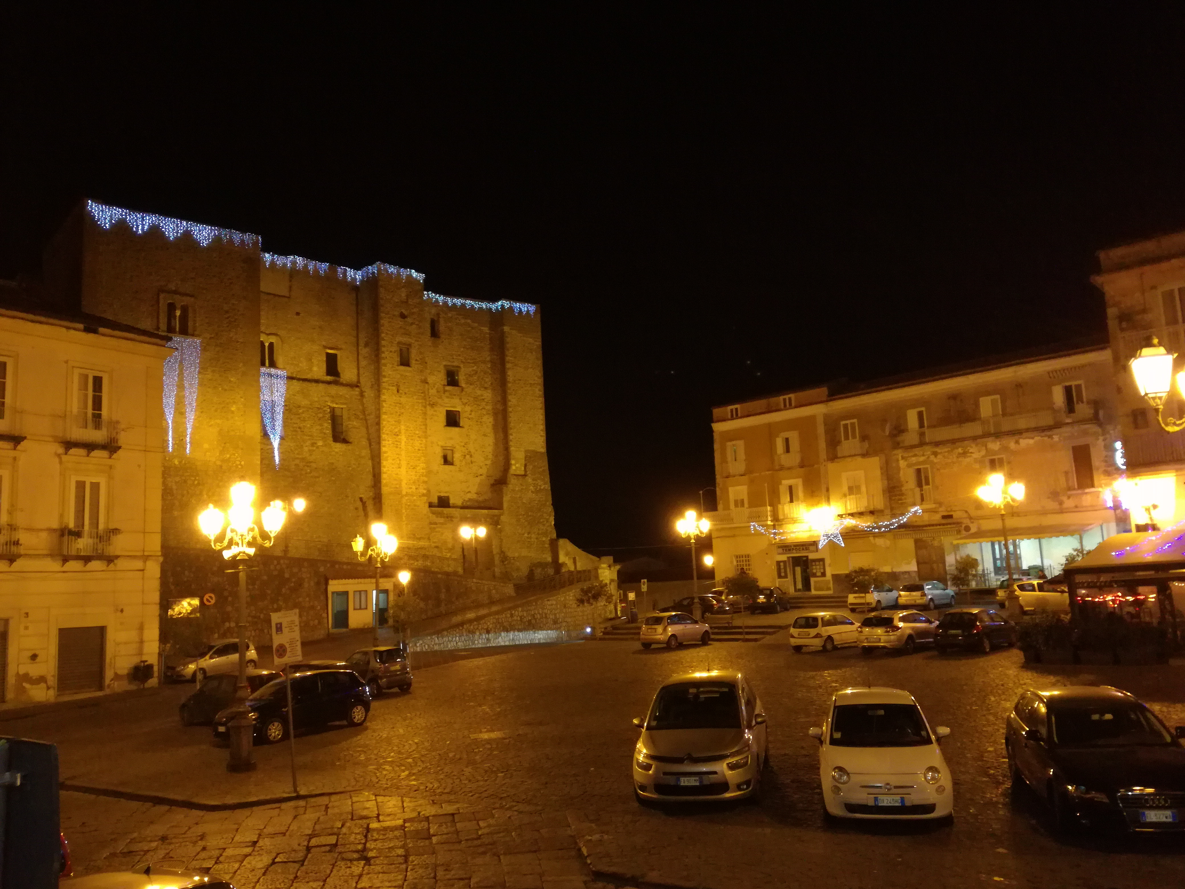 Piazza XX Settembre e il castello di Sessa Aurunca addobbate per le festività natalizie